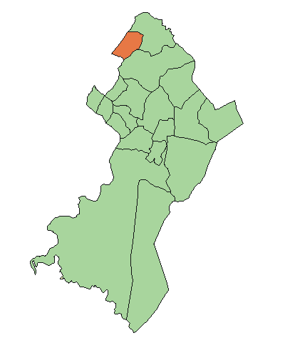 Ubicación de M. R. Alonso.